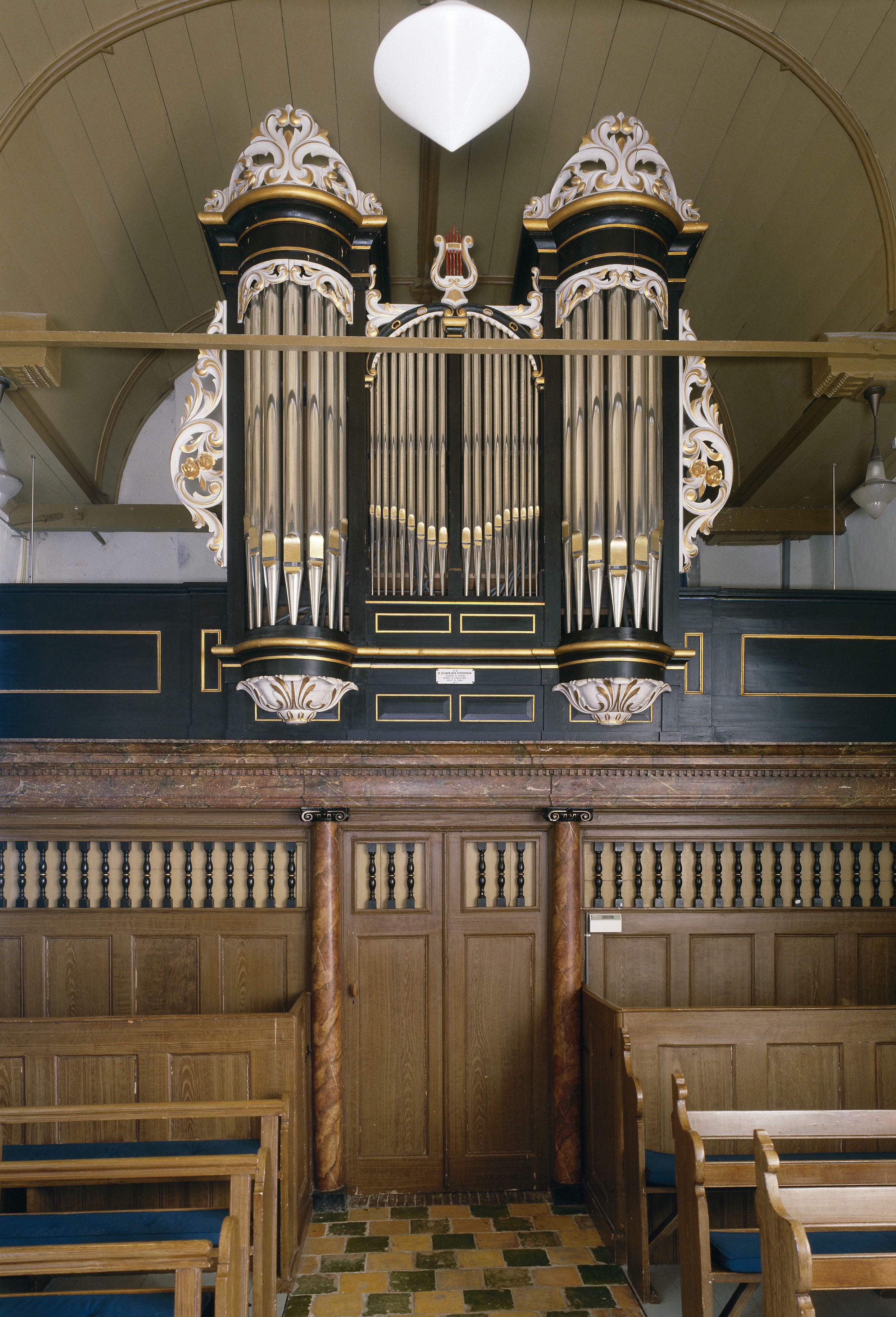 Hervormde Kerk: Interieur, aanzicht orgel, orgelnummer 1670 (opmerking: Gefotografeerd voor Het Historische Orgel in Nederland 1886-1894, bladzijde 147)